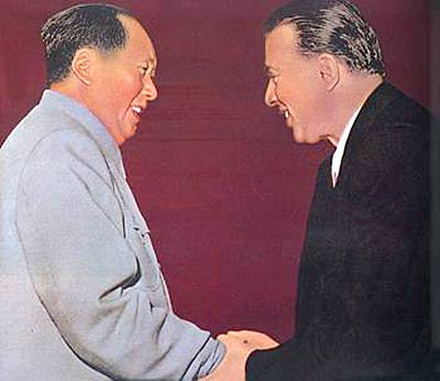 中文（中国大陆）: 毛泽东会见霍查